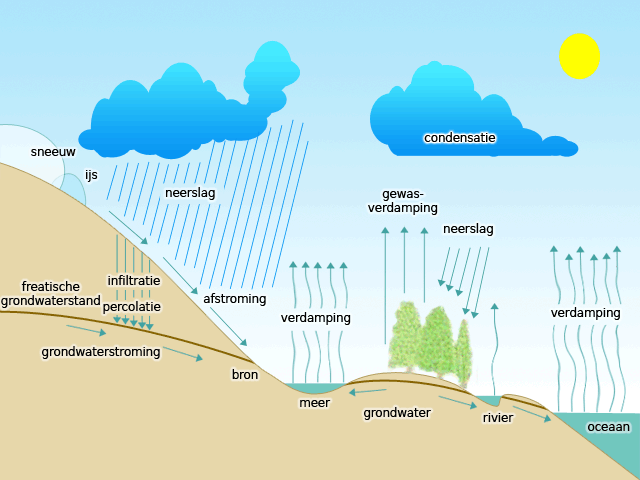 Zelf gemaakt, overgetekend van Hydrologische_cyclus.jpg